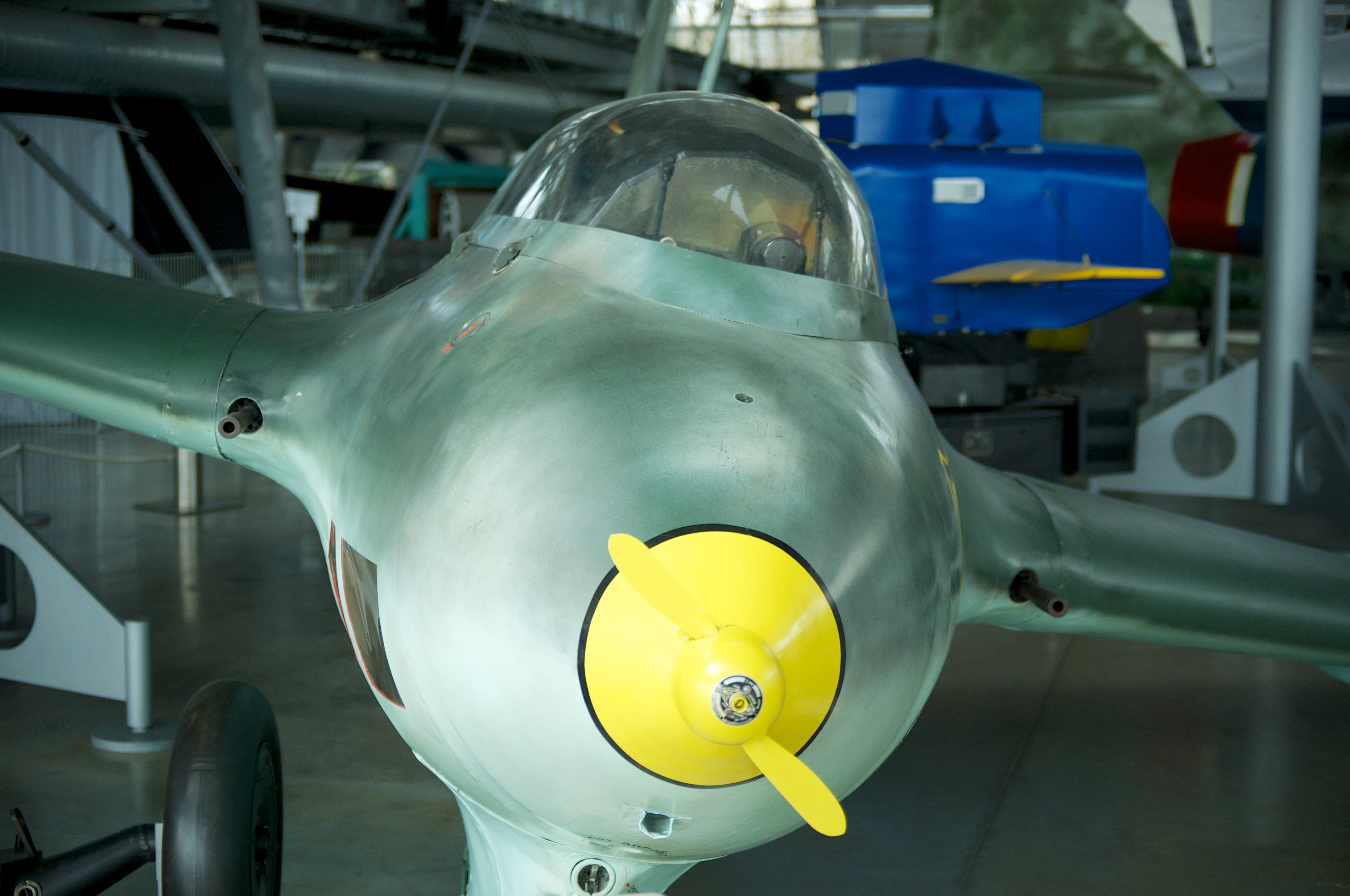 Messerschmitt Me 163 Detail Stauluftturbine Deutsches Museum Flugwerft Schleißheim